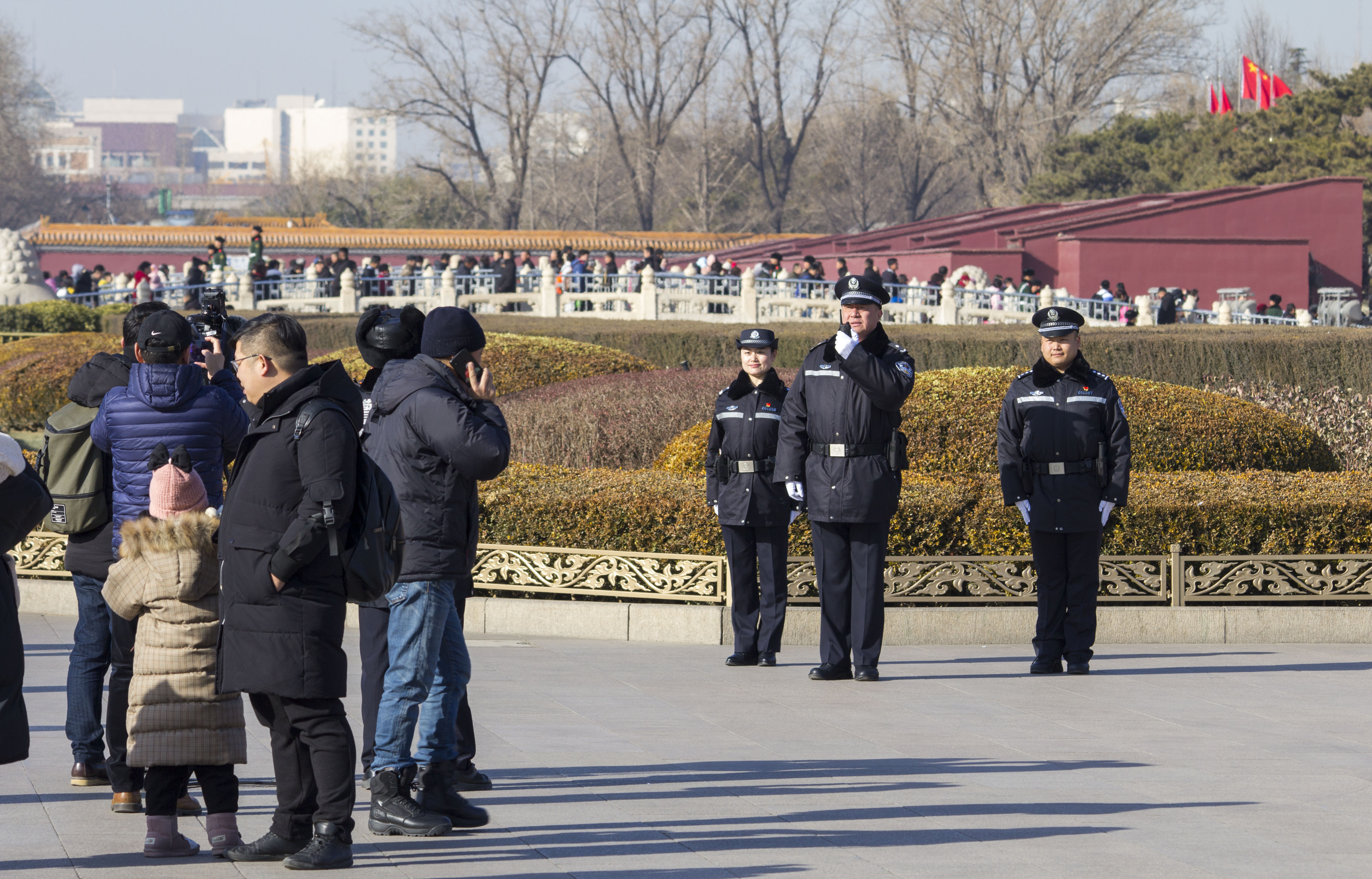 中文（中国大陆）: 三位中国人民警察在天安门前通过监控摄像向中国共产党的习近平总书记汇报工作。